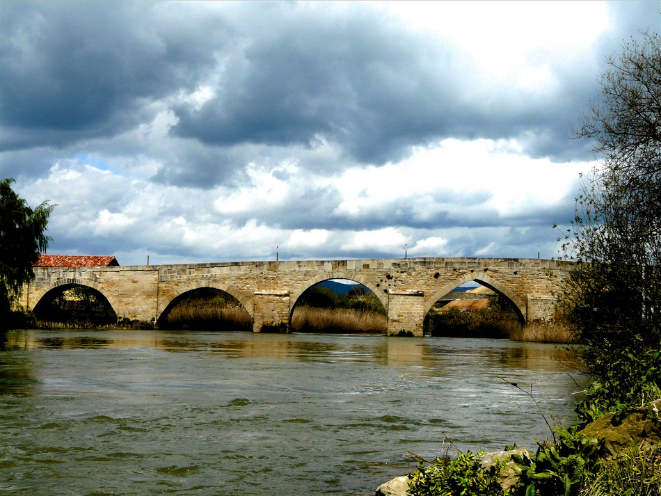 Armiñongo zubi erromatarra.